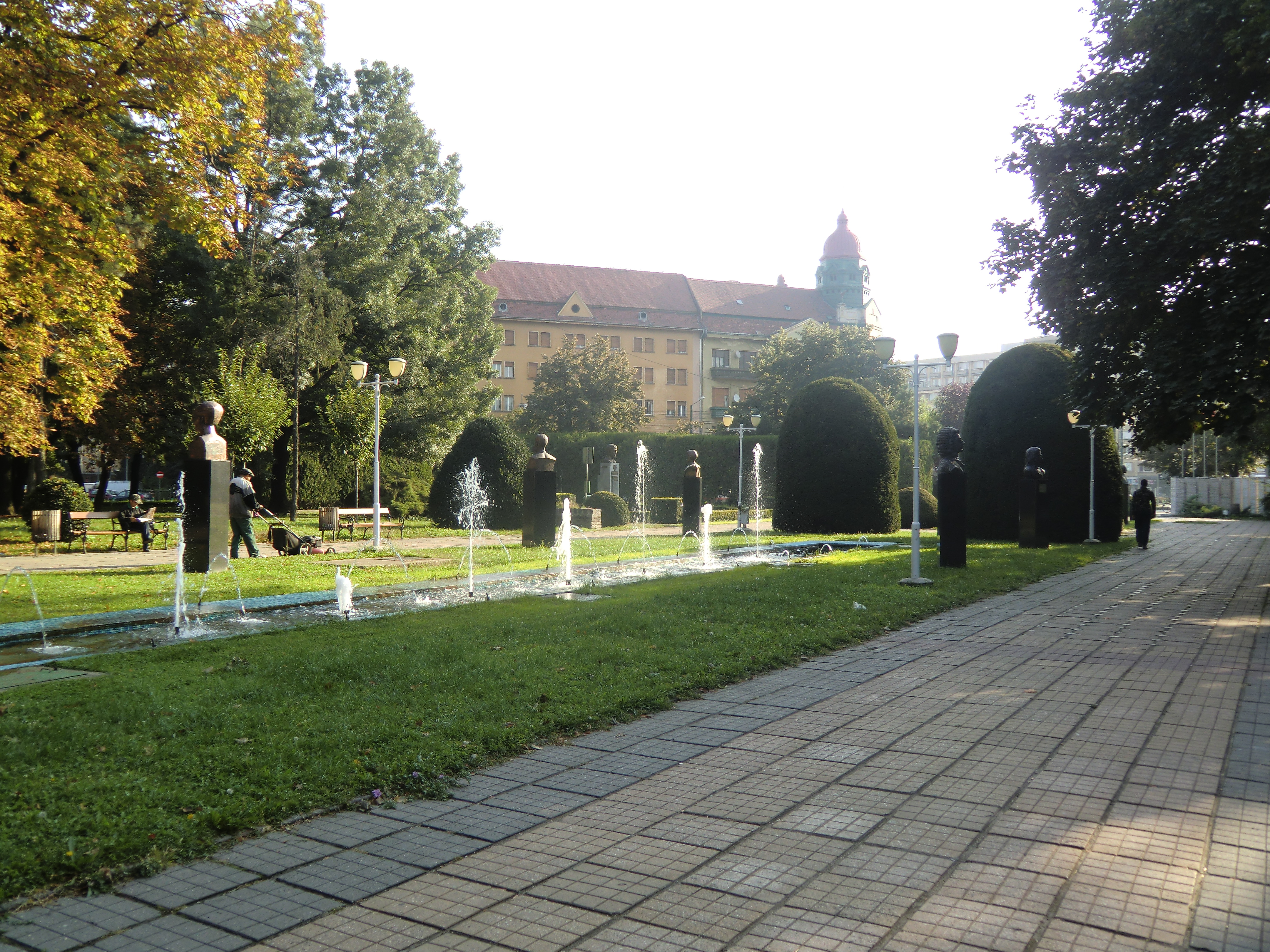 Zentralpark von Timișoara, Allee der Persönlichkeiten